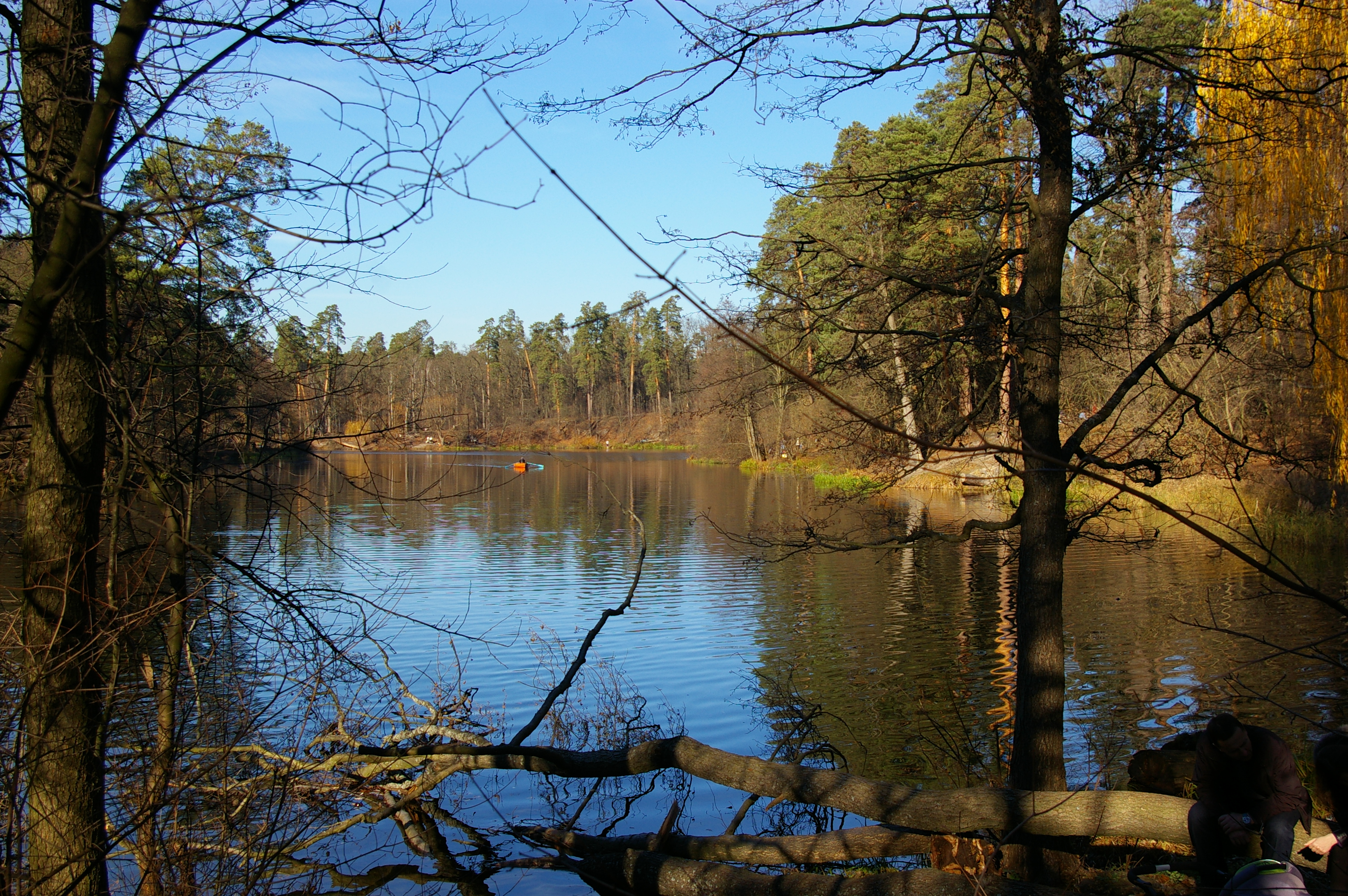 Пуща-Водицький лісопарк